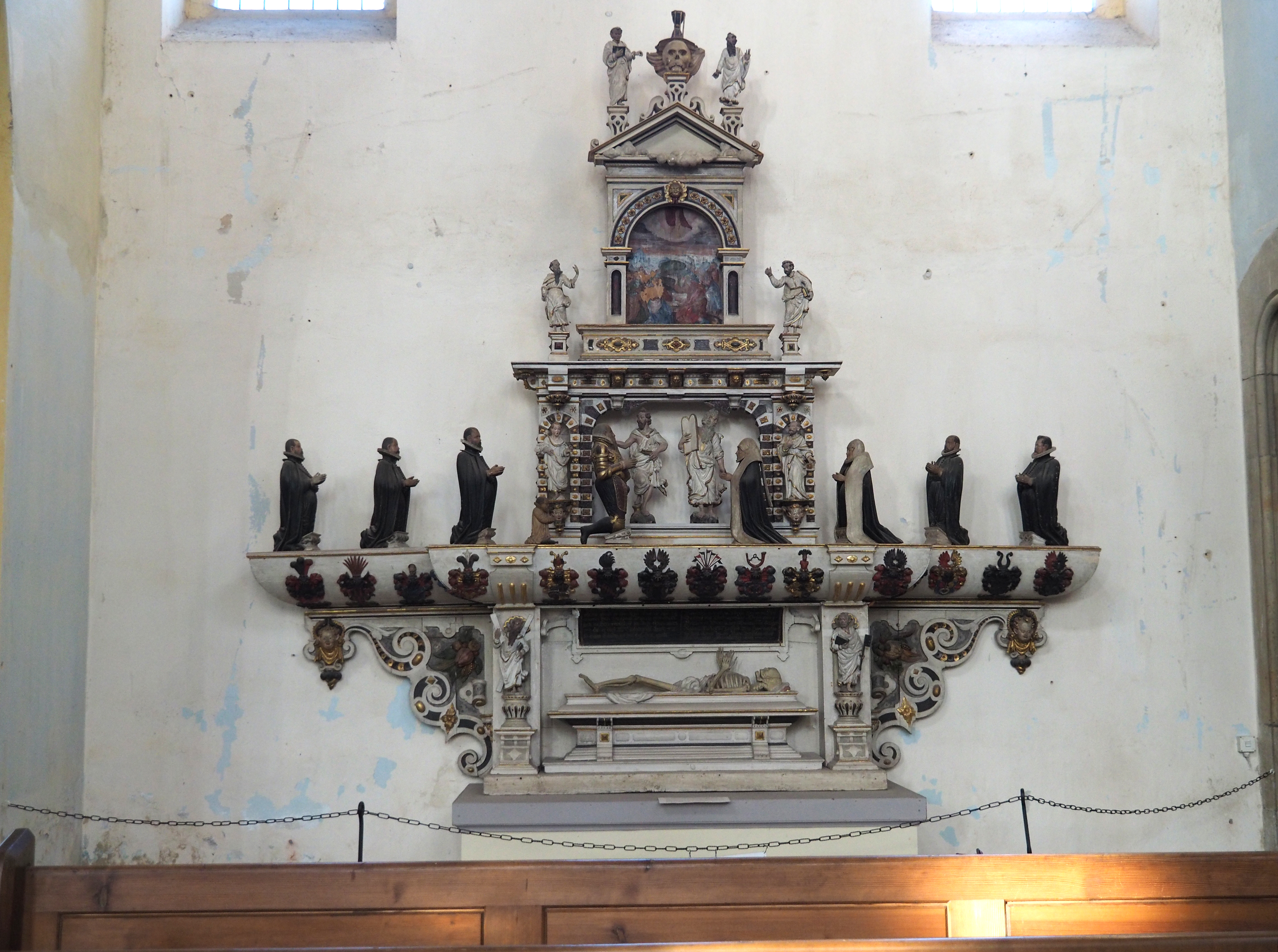 Epitaph für den Hauptmann der Grafschaft, Dietrich von Gnadenstedt († 1586), in der St. Sylvestri-Kirche, Wernigerode